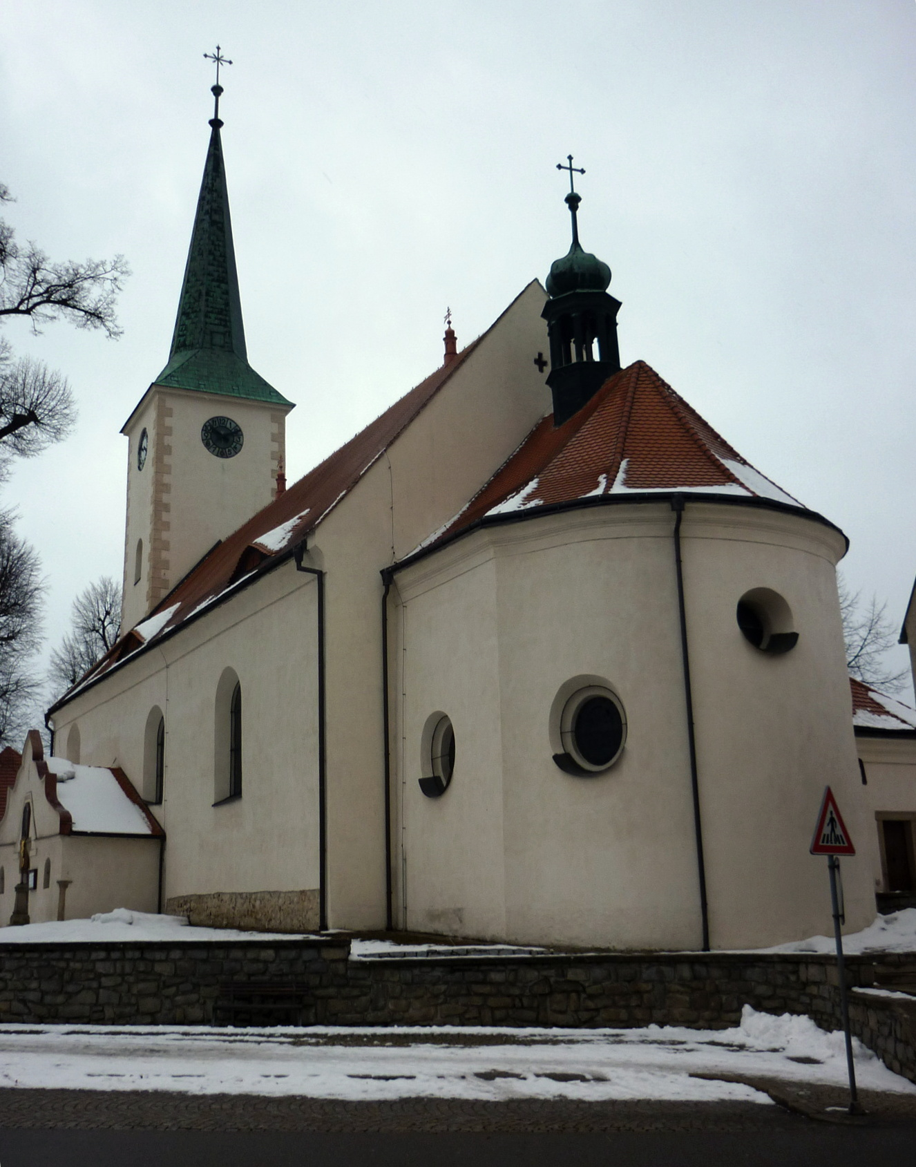 Kostel sv. Kateřiny Sienské v Třešti